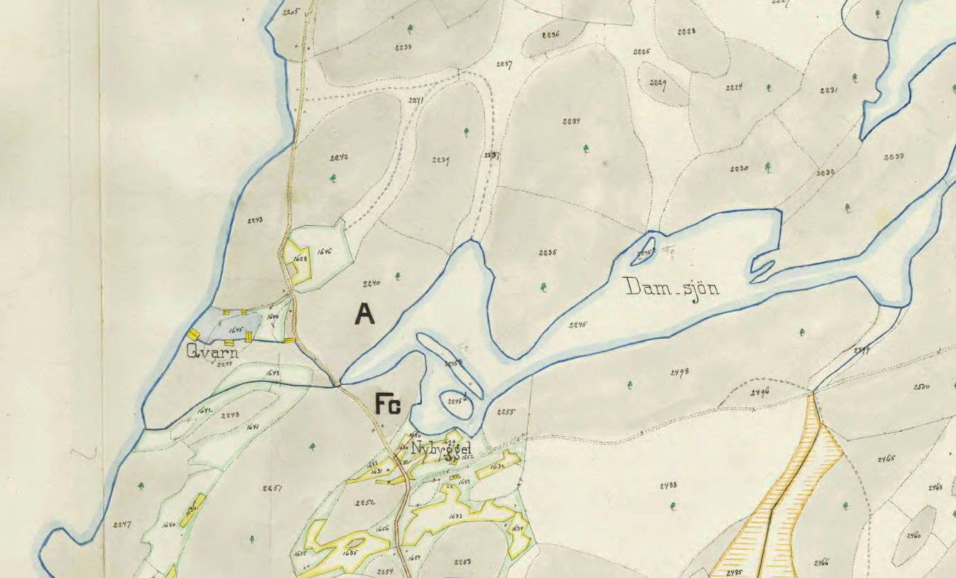 Del av Erstaviks ägor visande Erstaviks kvarn och Dammsjön